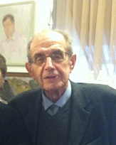 Владимир Эйтингон